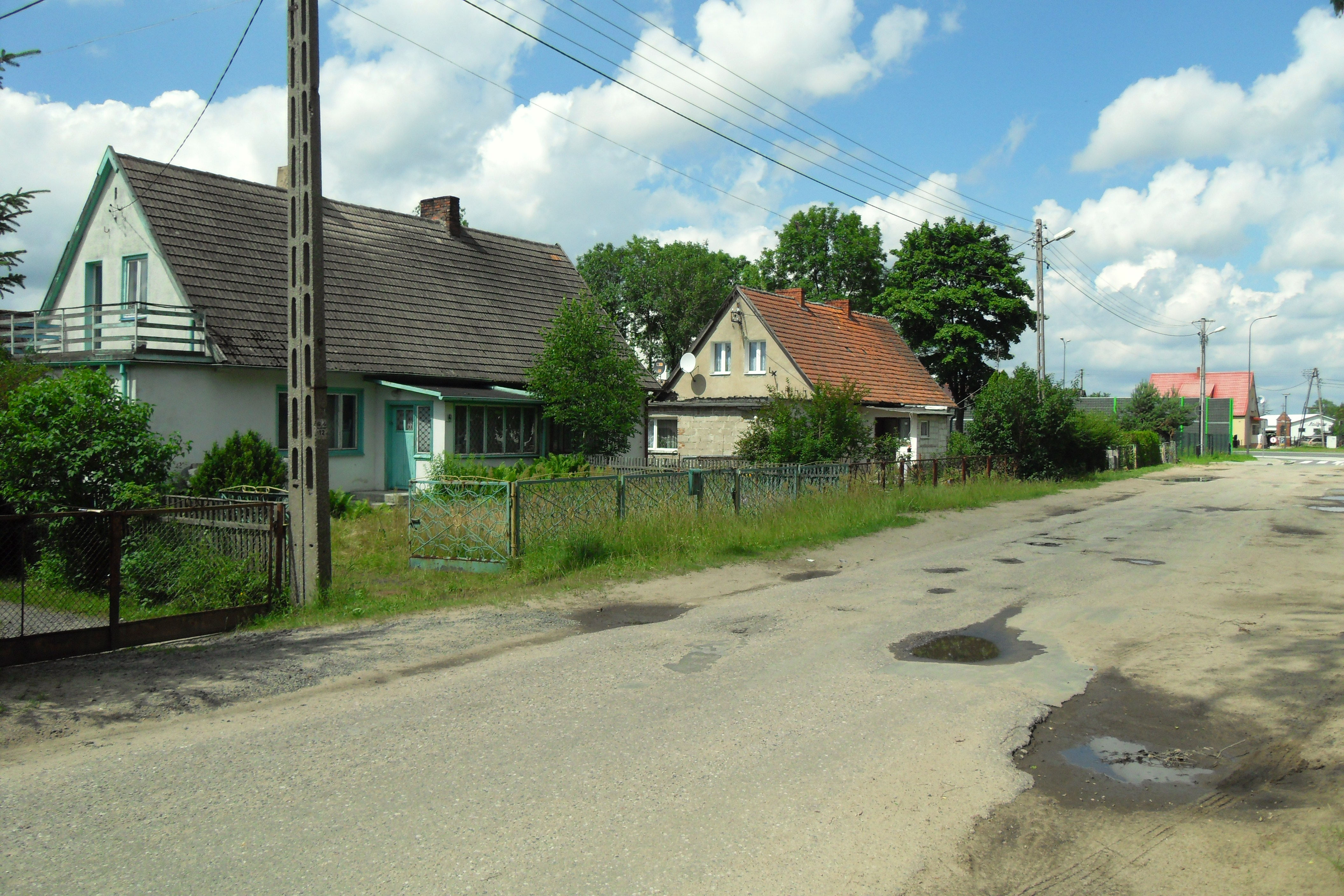 Gdańsk Firoga, ul. Szybowcowa.